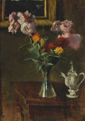 Stillleben des dänischen Malers Peter Alfred Schou (1844-1914)